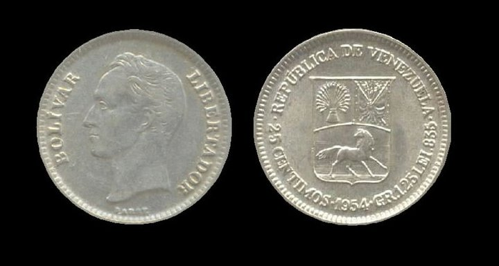 25 centimos 1954 Bs